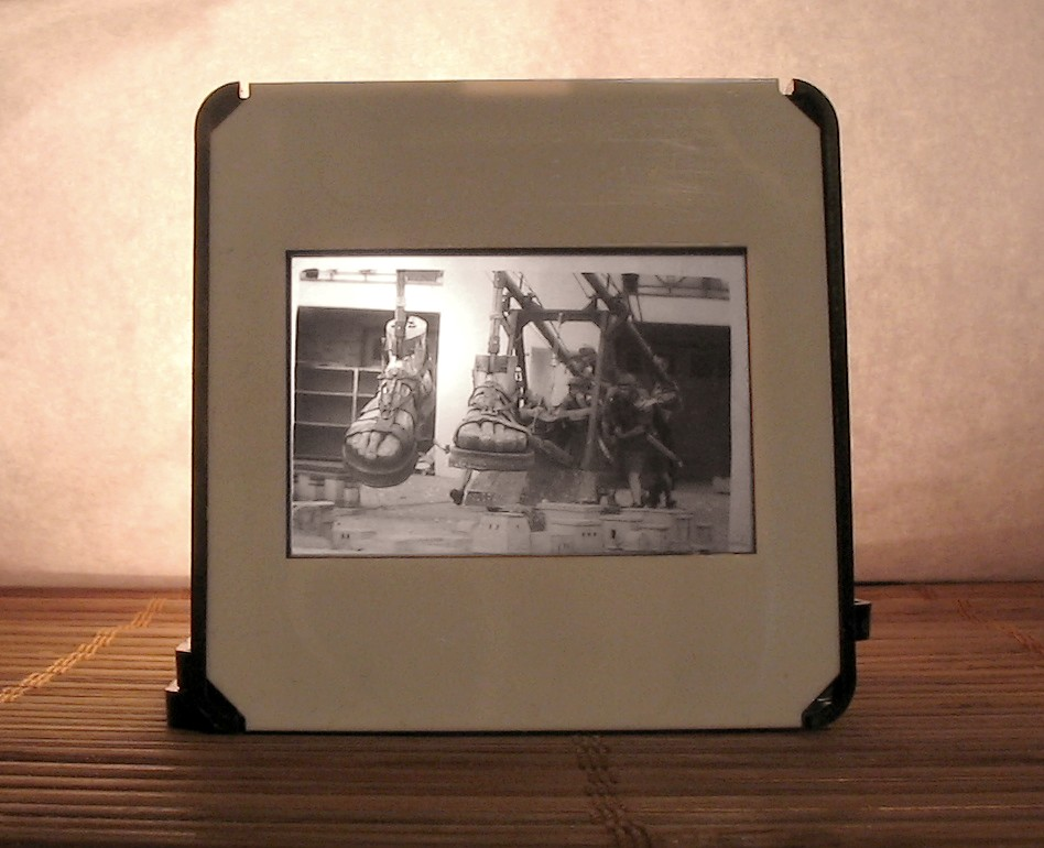 Czarno-biały diapozytyw w ramce